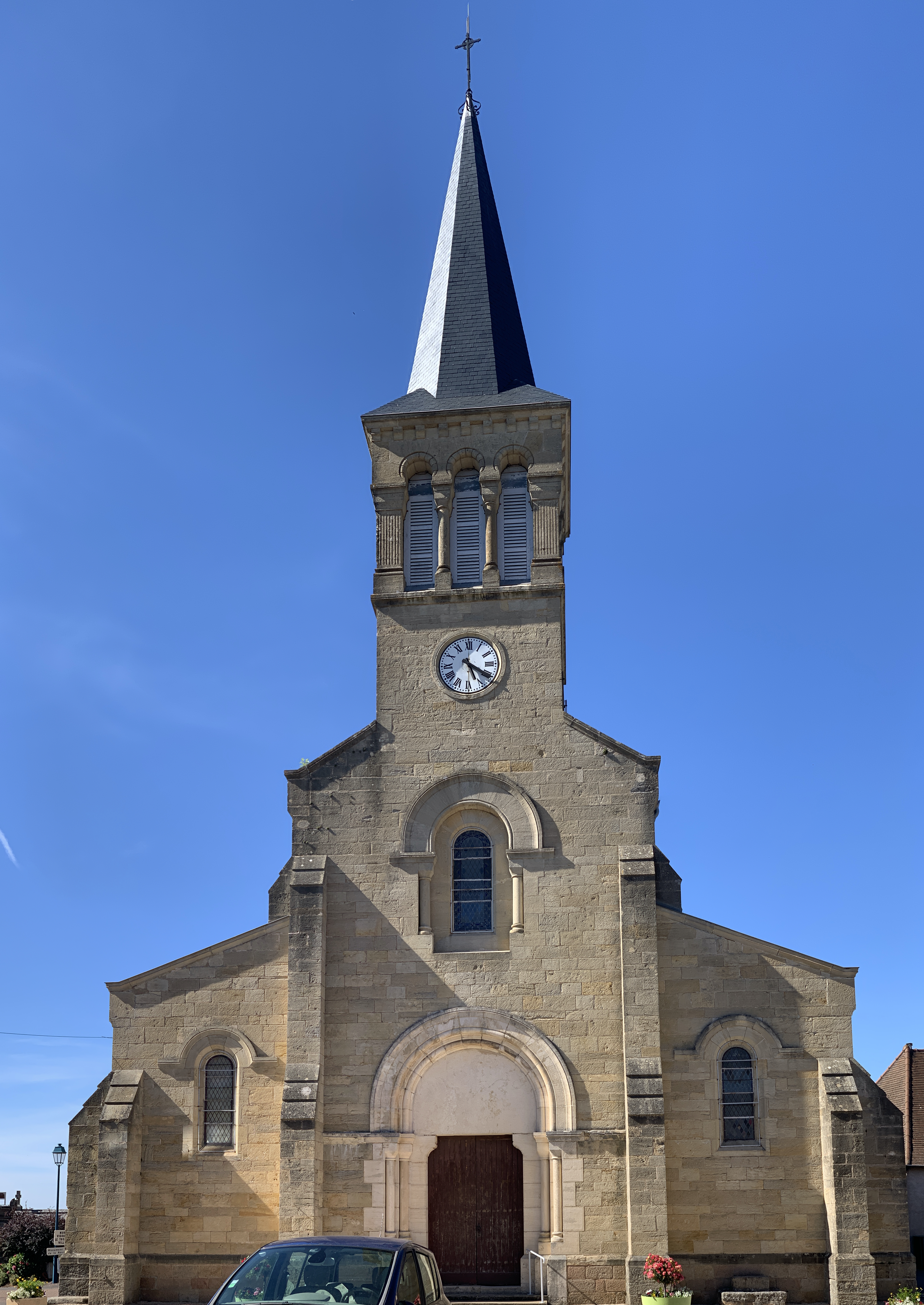 Église Saint-Barthélemy de Montmelard.